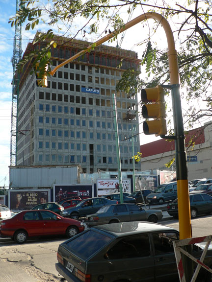 El Edificio Intecons junto al Dot Baires Shopping generan mucha polémica por el impacto ambiental que provocaron en el barrio de casas bajas de Saavedra, incluyendo las inundaciones del Barrio Mitre